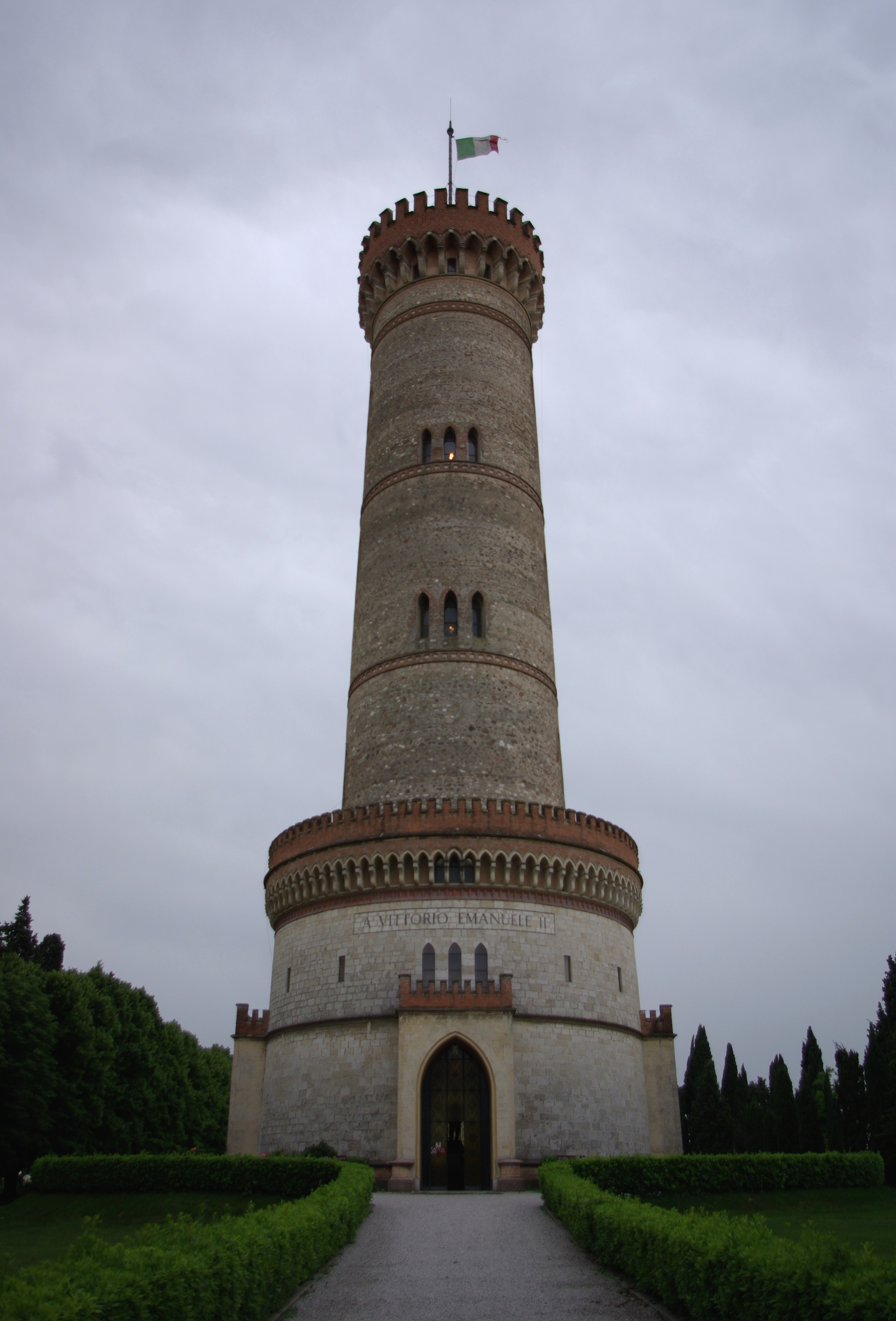 Turm der Gedenkstätte zur Schlacht von San Martino in San Martino della Battaglia bei Desenzano del Garda